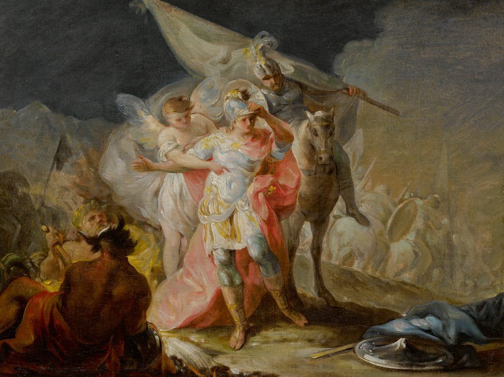 Segundo boceto preparatorio para Anibal vencedor contempla Italia desde los Alpes de Goya